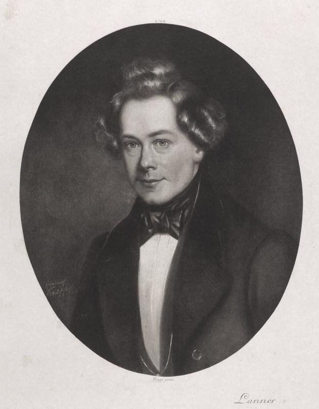 Joseph Lanner, Brustbildnis halb links in Oval